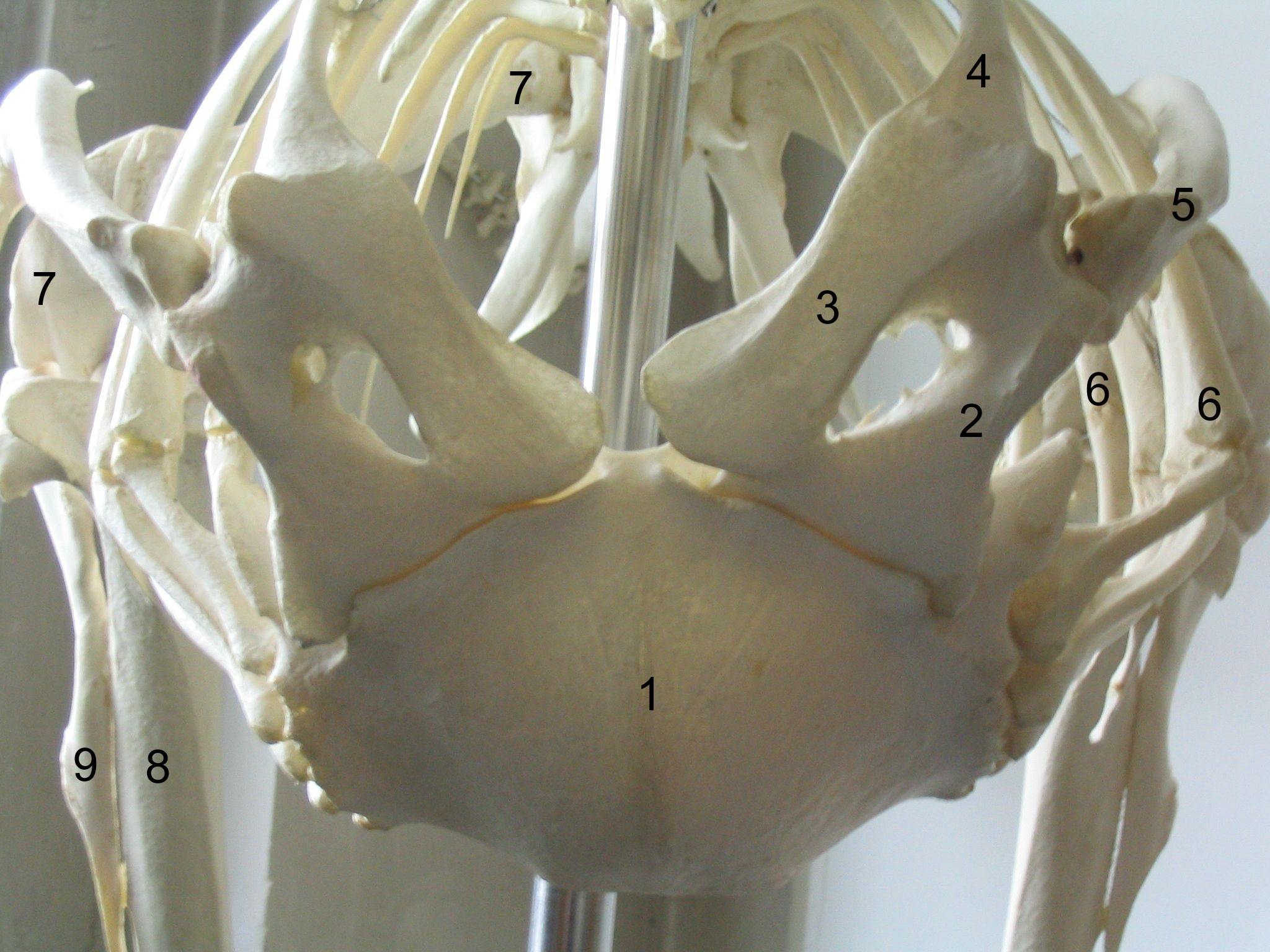 skeleton with shoulder girdle of an African Ostrich, front view 1 Sternum 2 Os coracoideum 3 Clavicula 4 Scapula 5 Humerus 6 Costae 7 Os femoris 8 Tibia 9 Fibula own photograph, taken from a specimen at the Institute of Veterinary anatomy of the Leipzig University (Germany) —Uwe Gille 08:06, 20 January 2006 (UTC) Фрагмент скелета африканского страуса, включающий плечевой пояс. 1. Sternum (грудина); 2. Os coracoideum (коракоид, вороновидная кость); 3. Clavicula (ключица); 4. Scapula (лопатка); 5. Humerus (плечевая кость); 6. Costae (рёбра); 7. Os femoris (бедренная кость); 8 Tibia (большая берцовая кость); 9. Fibula (малая берцовая кость). Снимок сделан в Институте ветеринарной анатомии Лейпцигского университета.